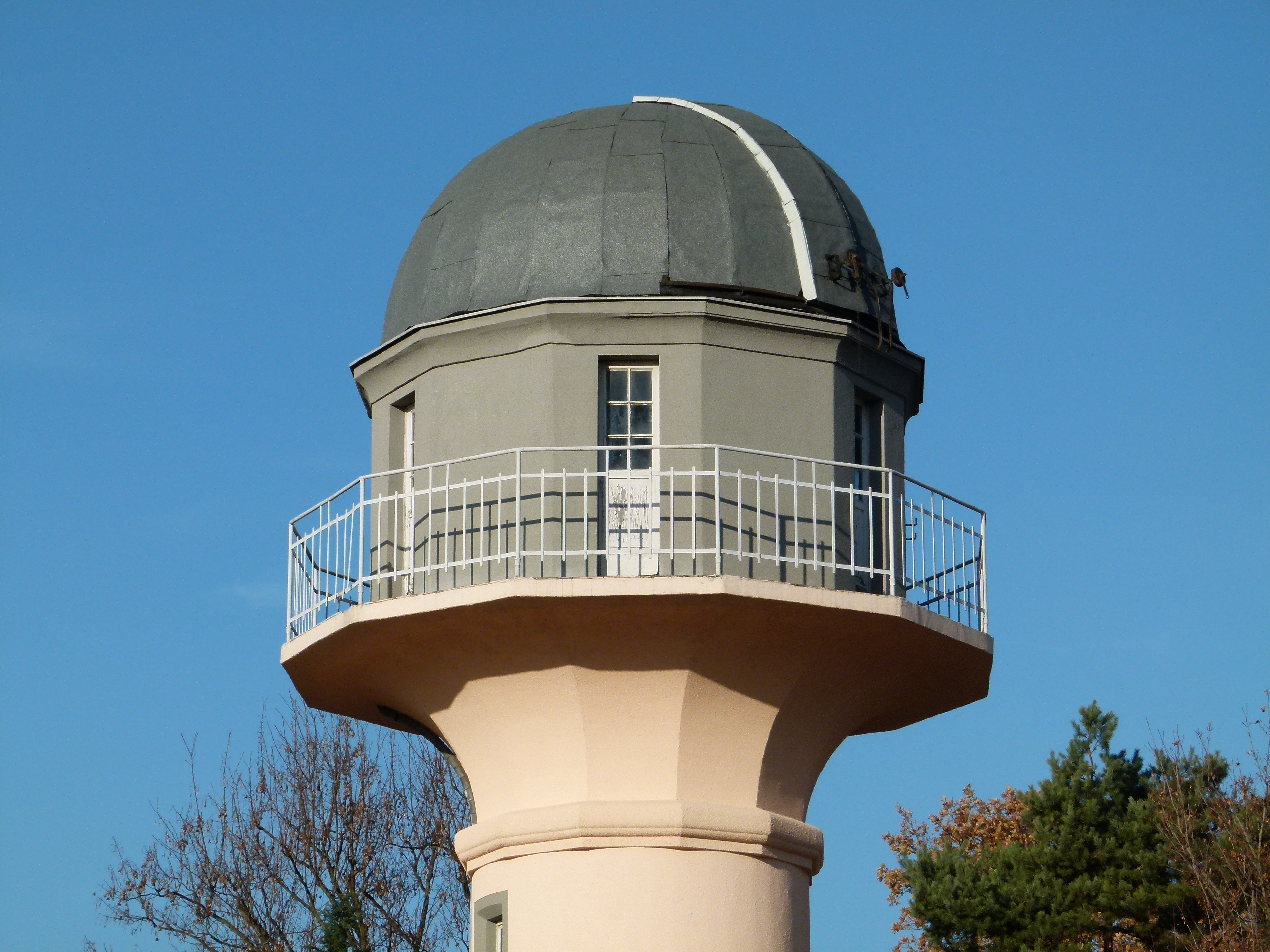 Alexander-Frantz-Sternwarte in Blasewitz, Dresden